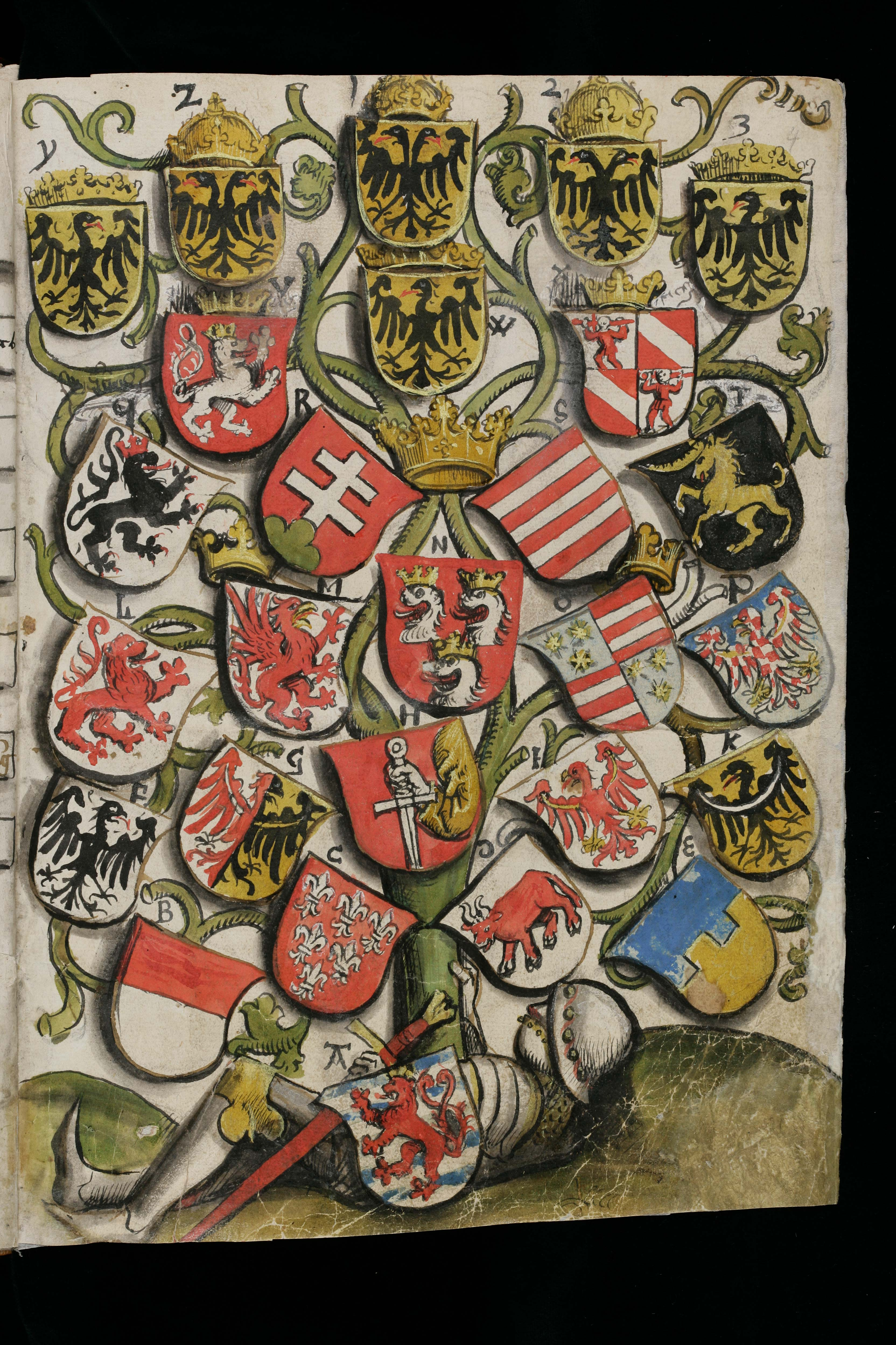 Wappenbuch des St. Galler Abtes Ulrich Rösch; Stiftsbibliothek St. Gallen, Cod. sang. 1084 Seite 4, Luxemburgische Wappen (Legende siehe Seite 3) 1. Reihe: Y: K. Wenzeslaus (von Luxemburg) Z: K. Karl 1: Kaiser Heinrich 2: K. Sigmund 3: K. Hans der Blinde (= Johann von Böhmen) 2. Reihe: V: Böhmen W: König Jost X: Bosnien 3. Reihe: Q: ? - (Argent a lion rampant sable crowned gules) (nach Clemmensen meishyn = Meißen, falsch tingiert) R: Neuungarn („Jersualem“) S: Altungarn T: „Sirni“ (In Schwarz ein goldenes Einhorn) ?? 4. Reihe: L: Görlitz M: Stettin N: Dalmatien O: Cilli P: Mähren 5. Reihe: F: Sittow (Zittau?) G: Schweidnitz H: Granatz (?) I: Brandenburg K: Schlesien 6. Reihe: B: „Lusin“ (?) (Party per fess gules and argent) C: Breslau D: Lusitz E: Bautzen 7. Reihe: A: Luxemburg